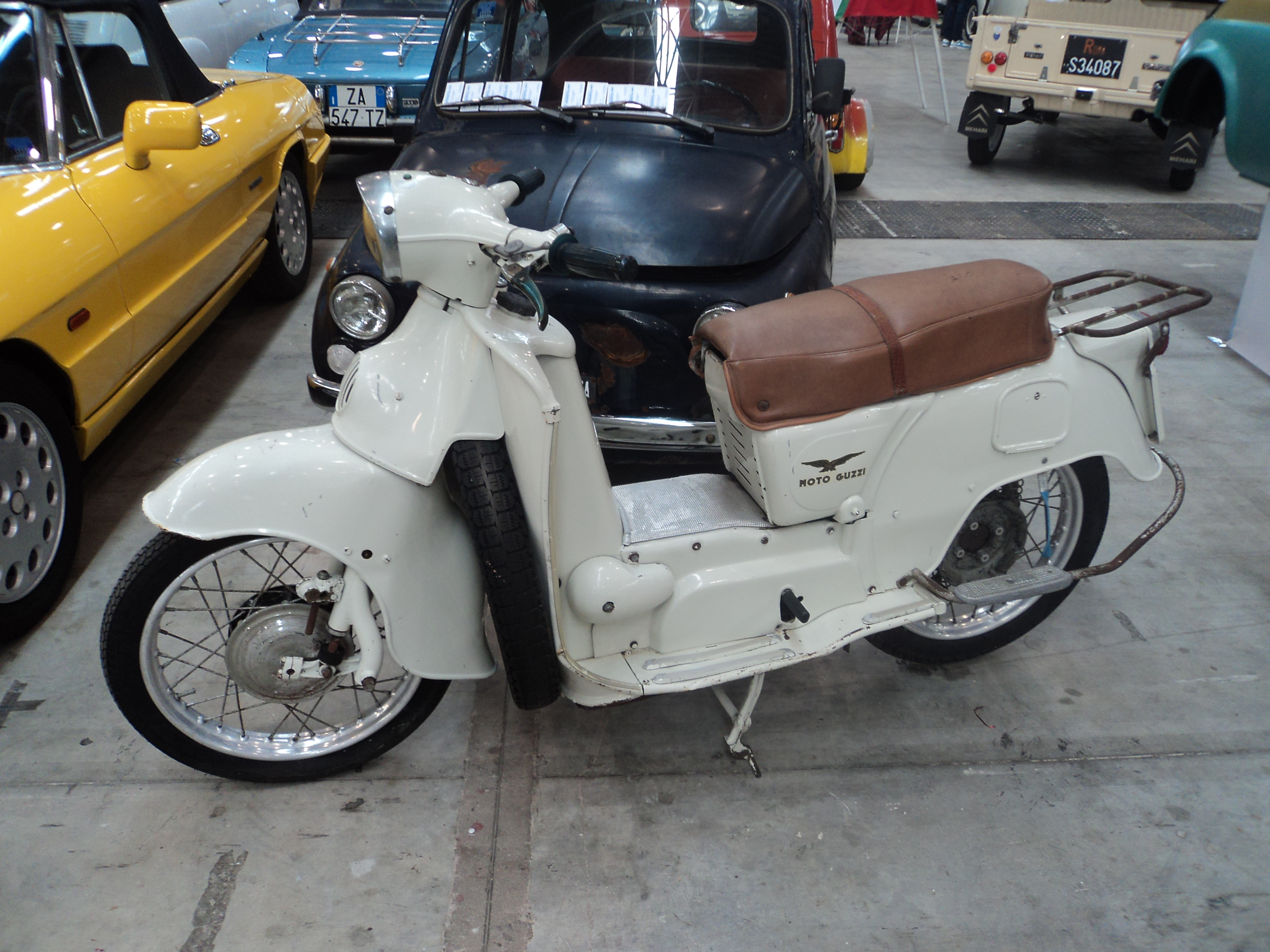 Fuoriserie 2014